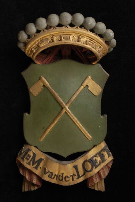 Wapenschild van Manta Meijndert van der Loeff (1752-1823), regent van het gasthuis aan de Hoogstraat in Rotterdam.